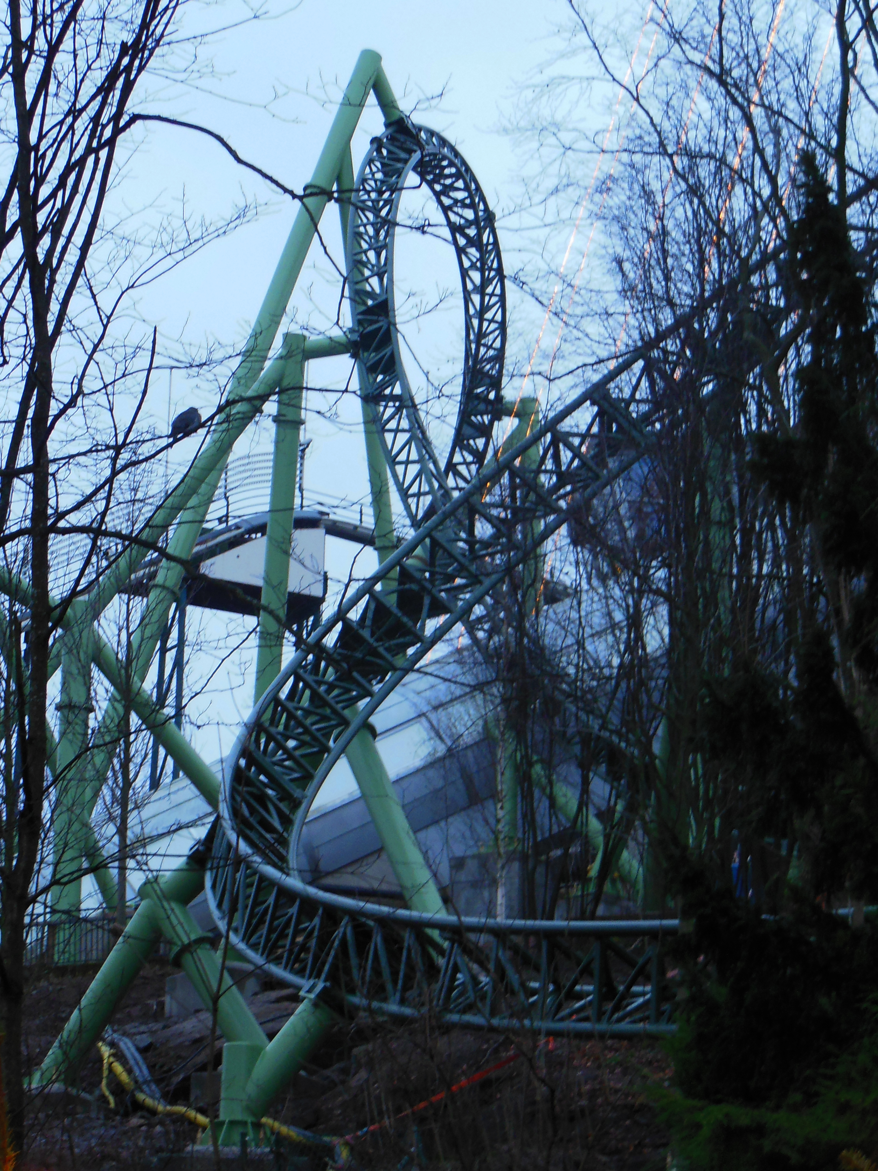 Berg- och dalbanan Helix (på Liseberg i Göteborg) under uppbyggnad i december 2013.